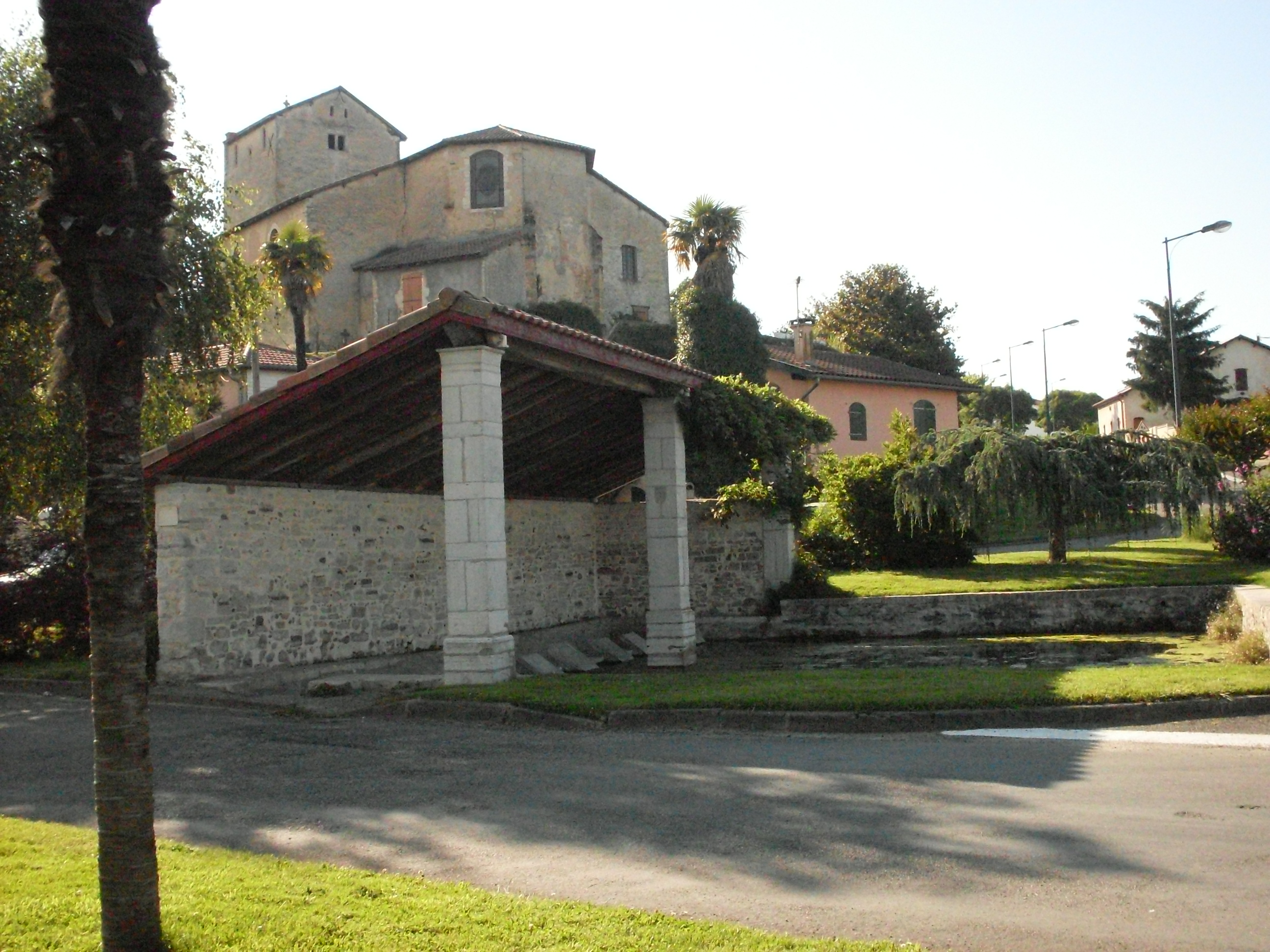 Orthevielle, Landes, France